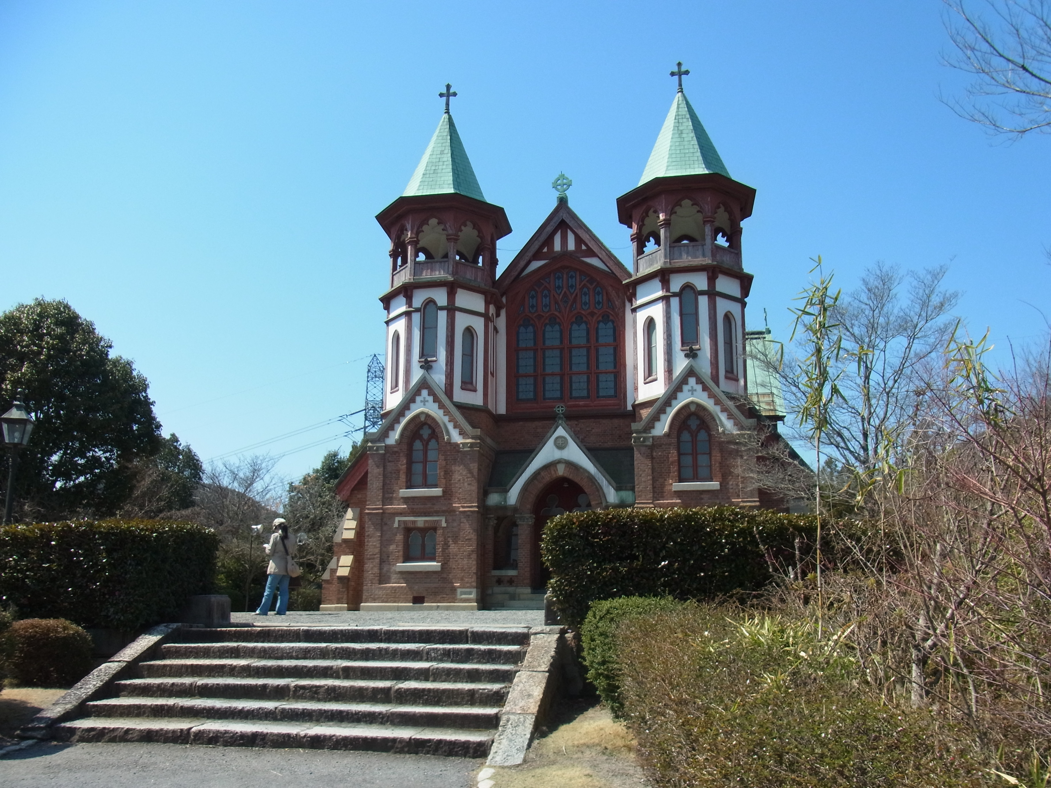 明治村、聖ヨハネ教会堂